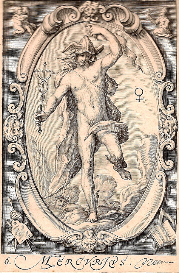 Kopergravure